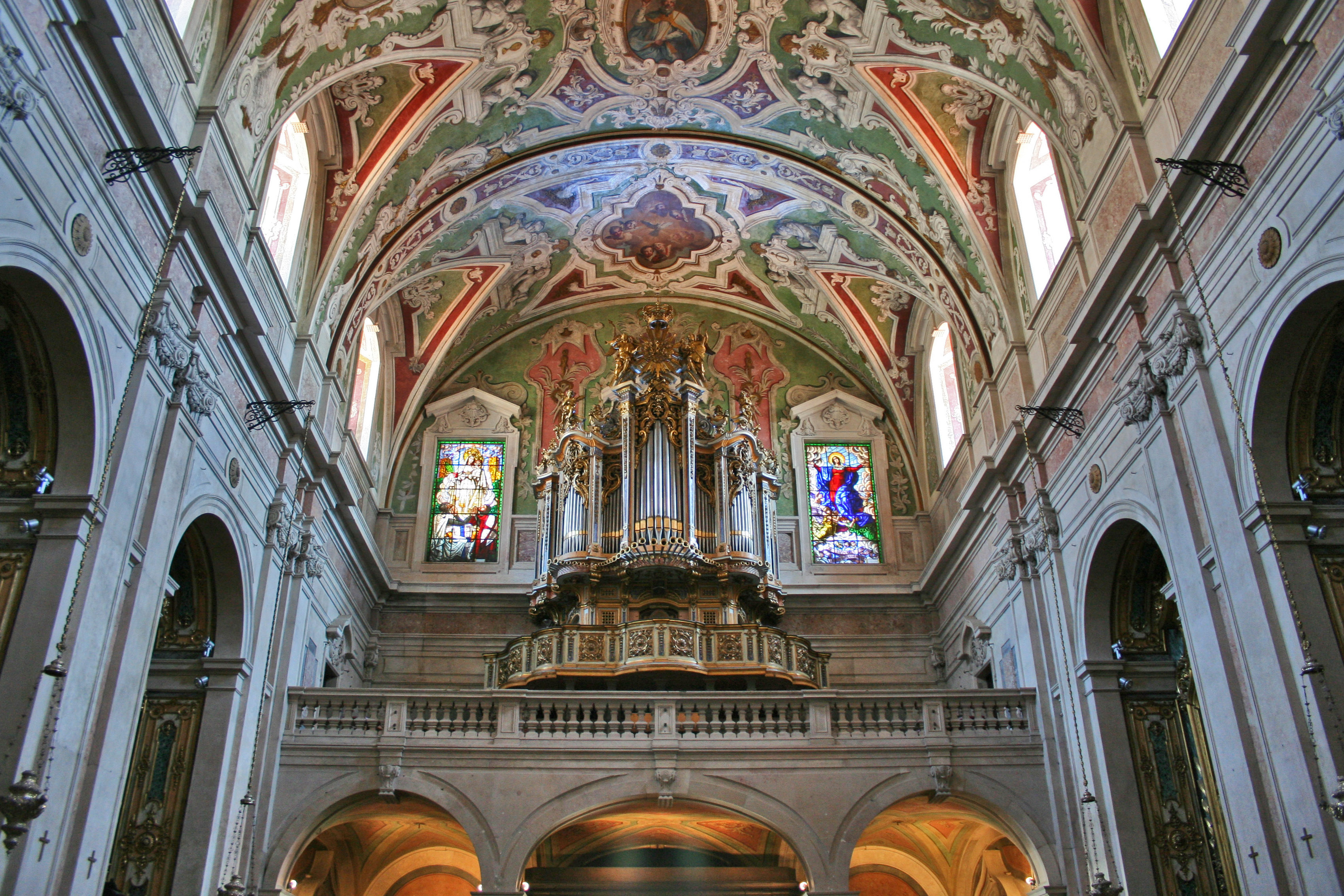 Igreja de Nossa Senhora dos Mártires This file was uploaded for Wiki Loves Monuments in Portugal with the unique identifier 74983.